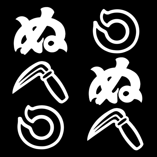 役者文様「鎌輪ぬ」（染抜）